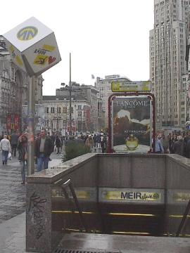 Ingang PM-station Meir